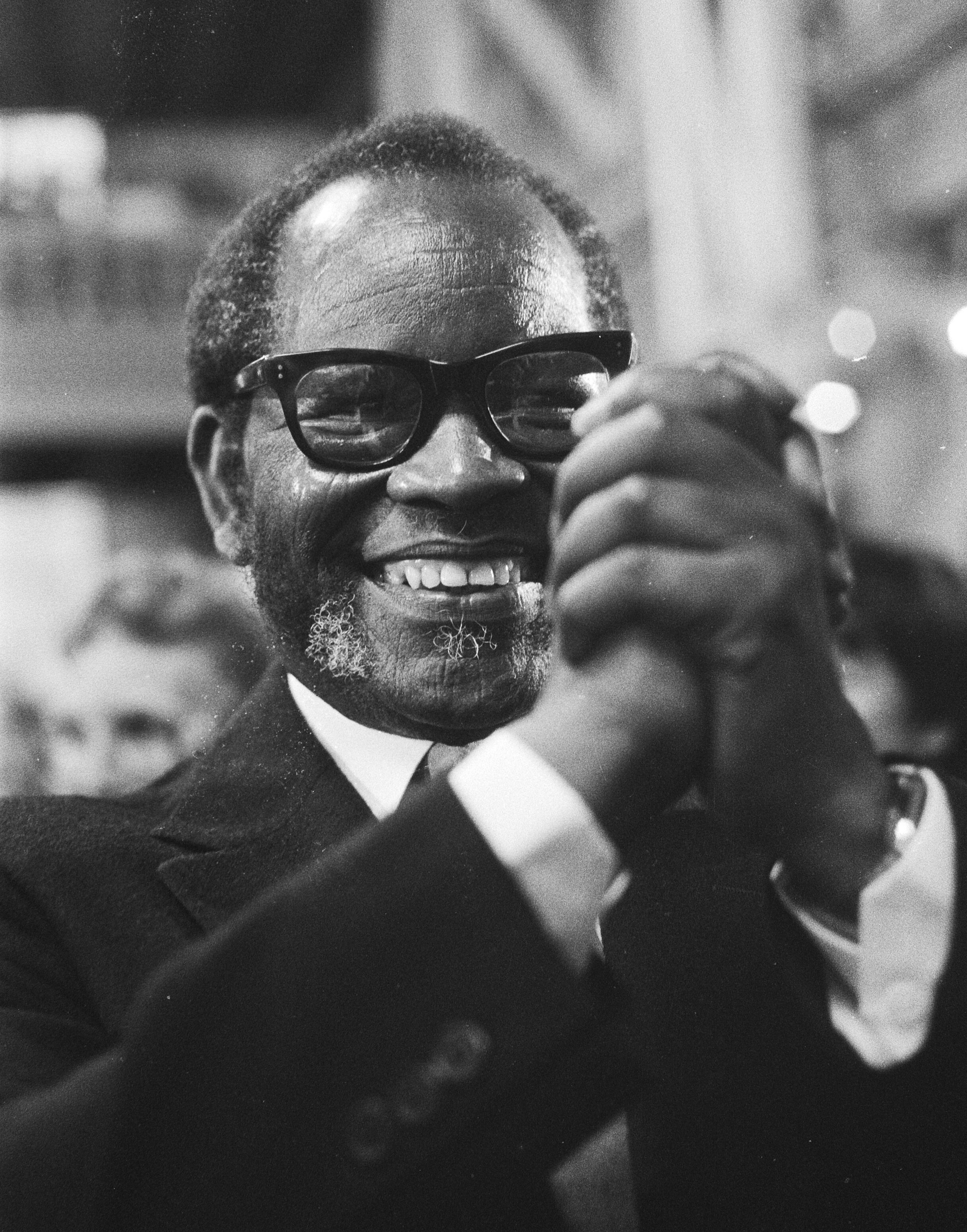 ANC-voorzitter Oliver R. Tambo als gastspreker. Opening Academisch Jaar Universiteit van Amsterdam. 5 sept. 1983